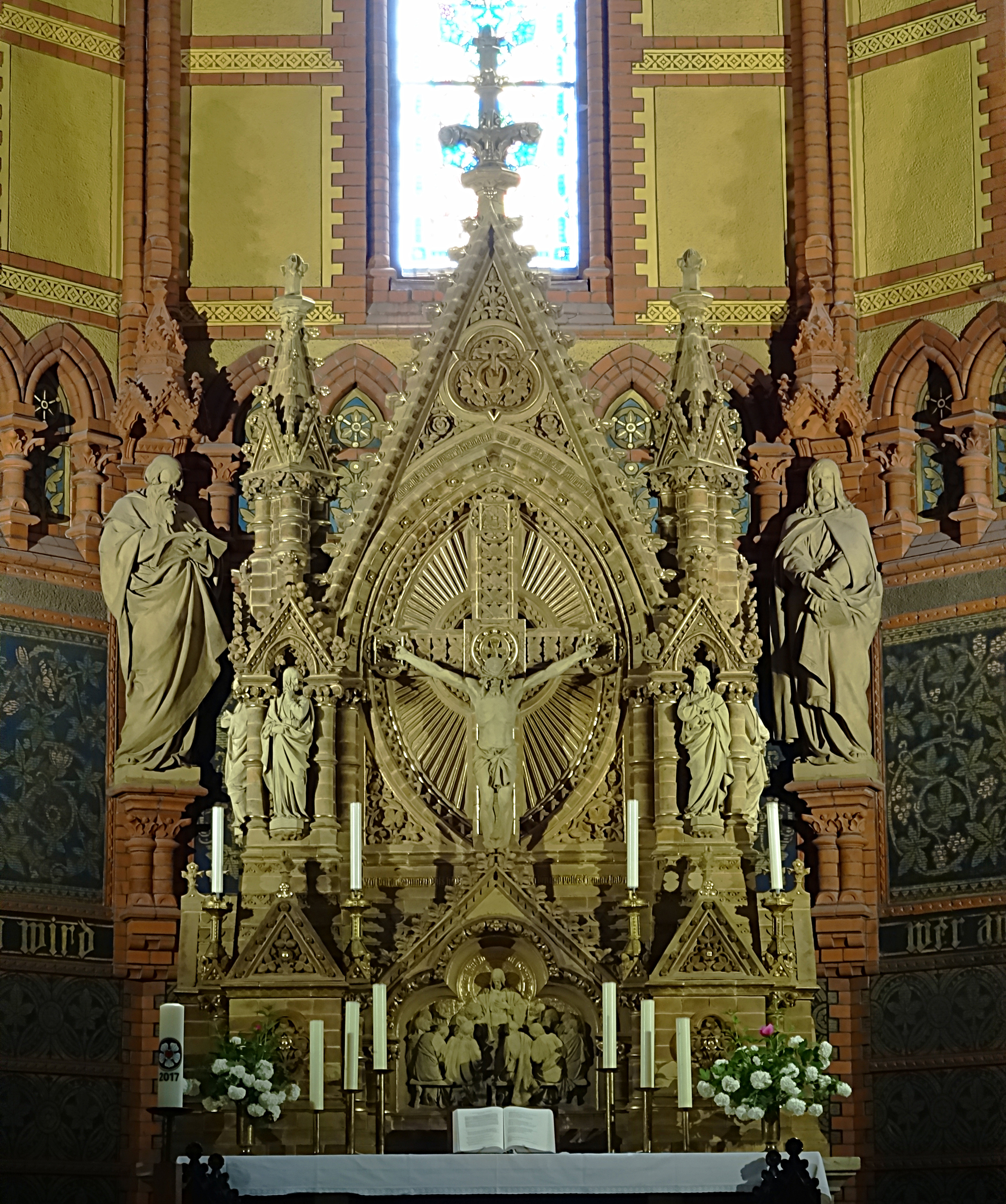 der Backstein-Altar mit Statuen der Apostel Paulus und Petrus, Christus am Kreuz und dem Abendmahl. (Paulus und Petrus stammen von Hermann Kokolsky)